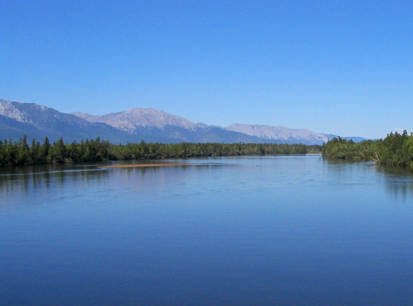 Verkhnyaya Angara river, Buryatia, Russia